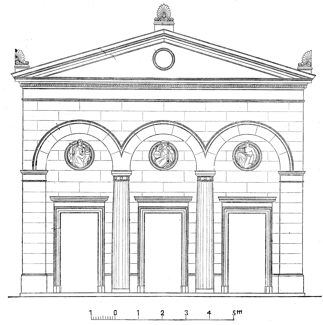 Zeichnung Steuerhaus Charlottenburger Brücke